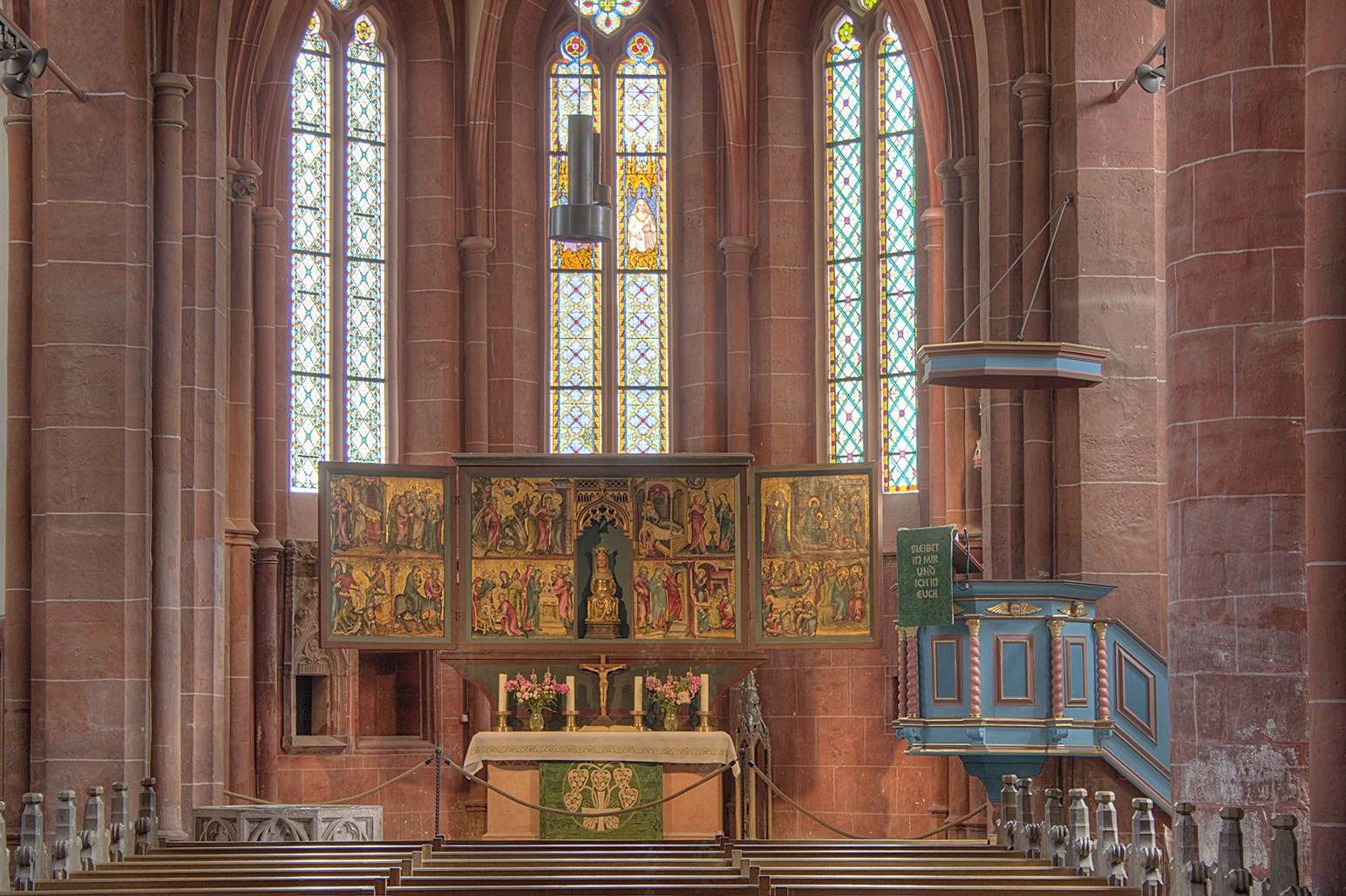 Innenansicht der Liebfrauenkirche in Schotten im Vogelsbergkreis mit dem Flügelaltar (Hochaltar). Der Altar zählt zu den Hauptwerken der spätgotischen Malerei.